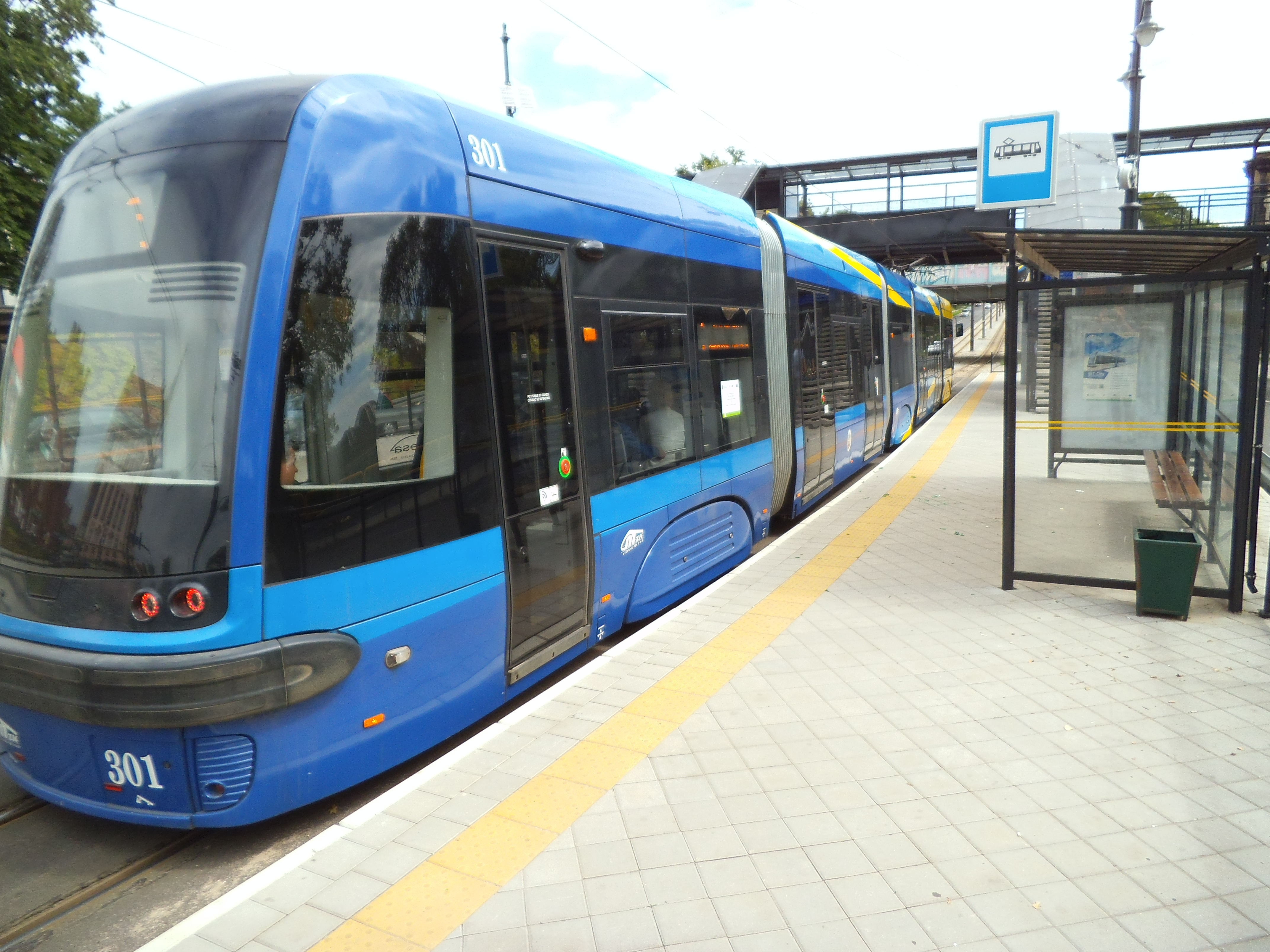 Toruń Miasto202